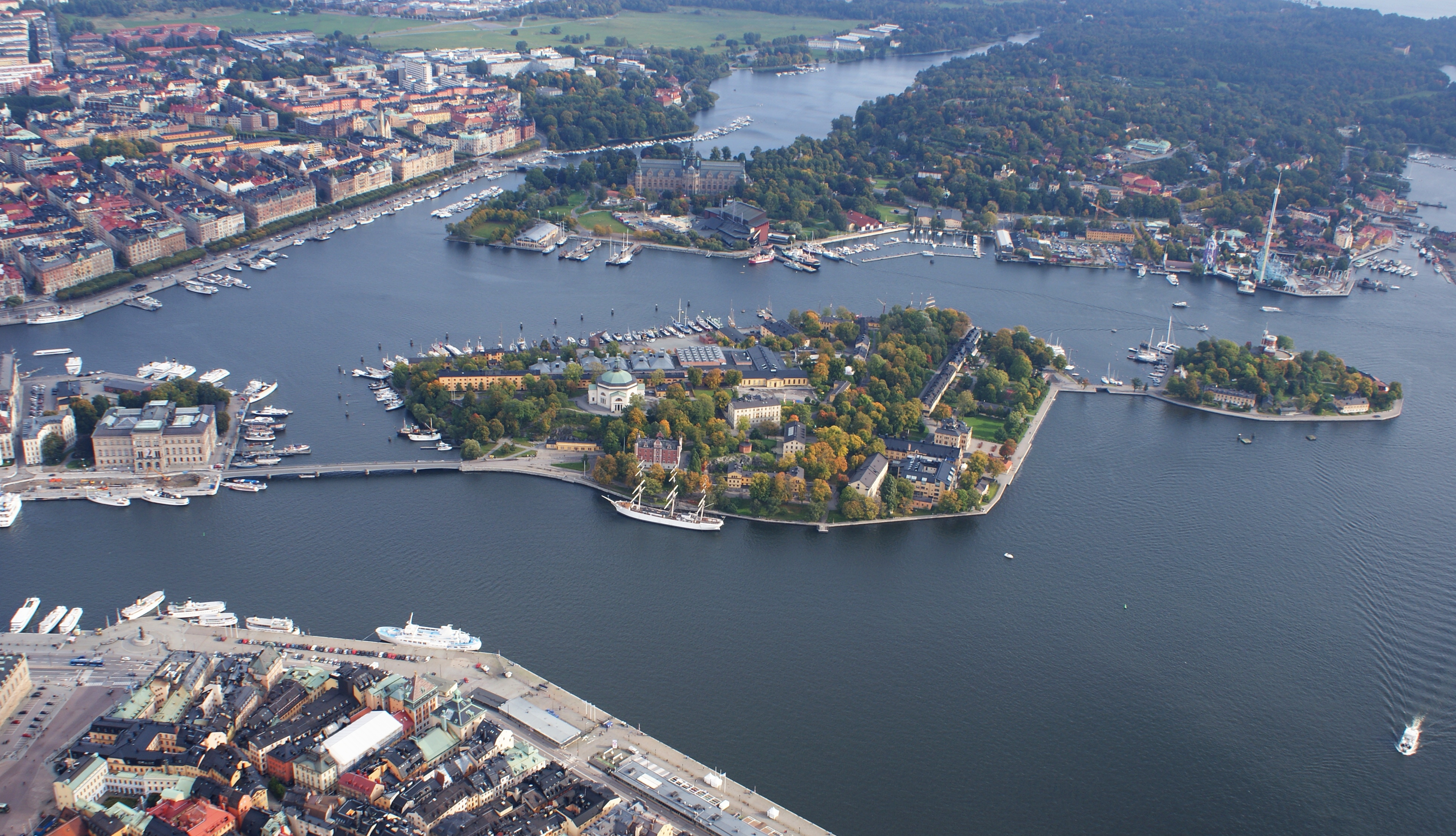 Saltsjön sedd från helikopter.